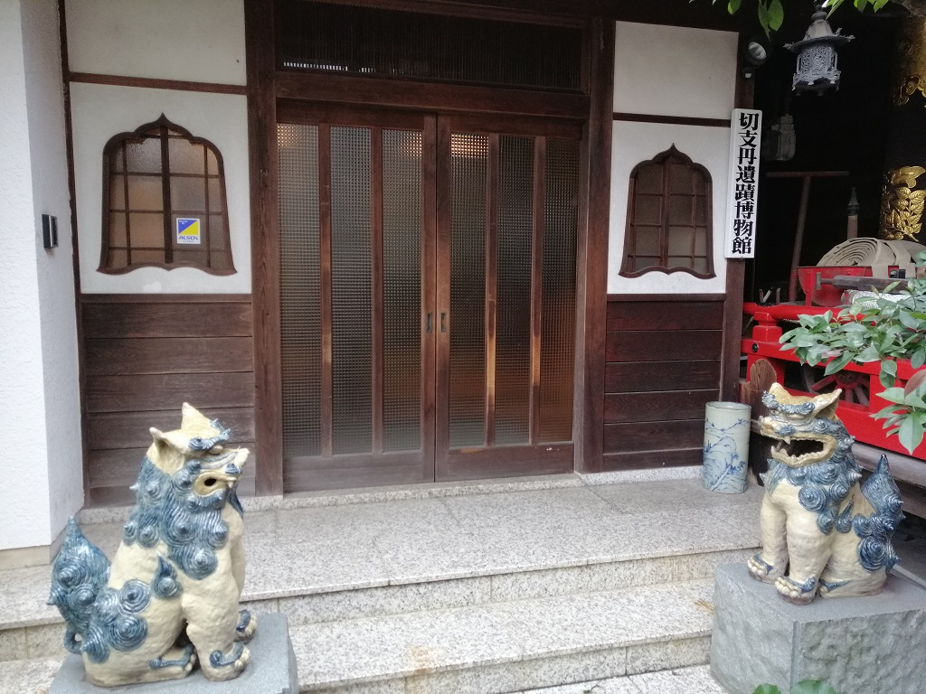 切支丹遺蹟博物館（栄国寺内）